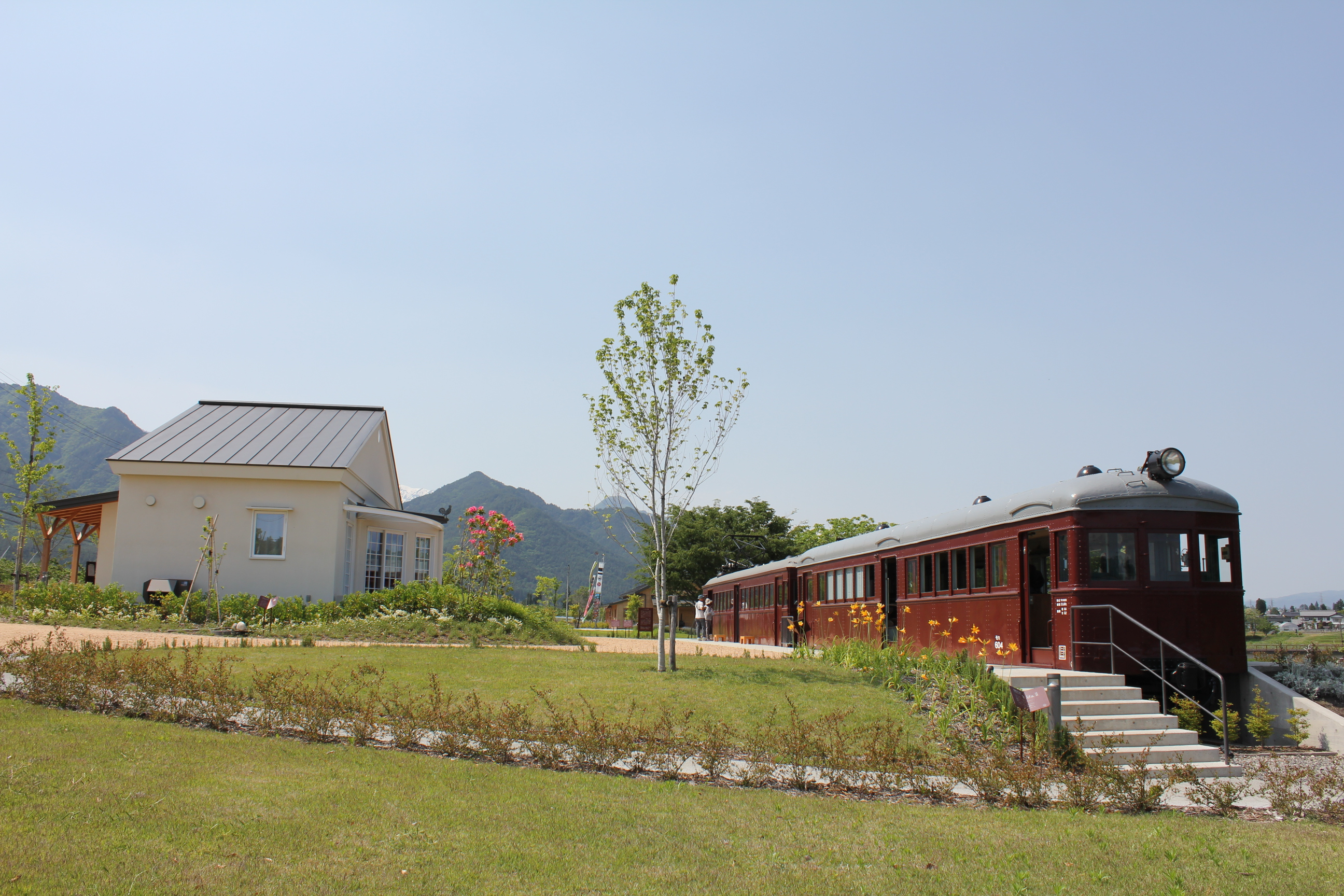 安曇野ちひろ公園のトットちゃん広場にあるトモエの講堂とモハ604